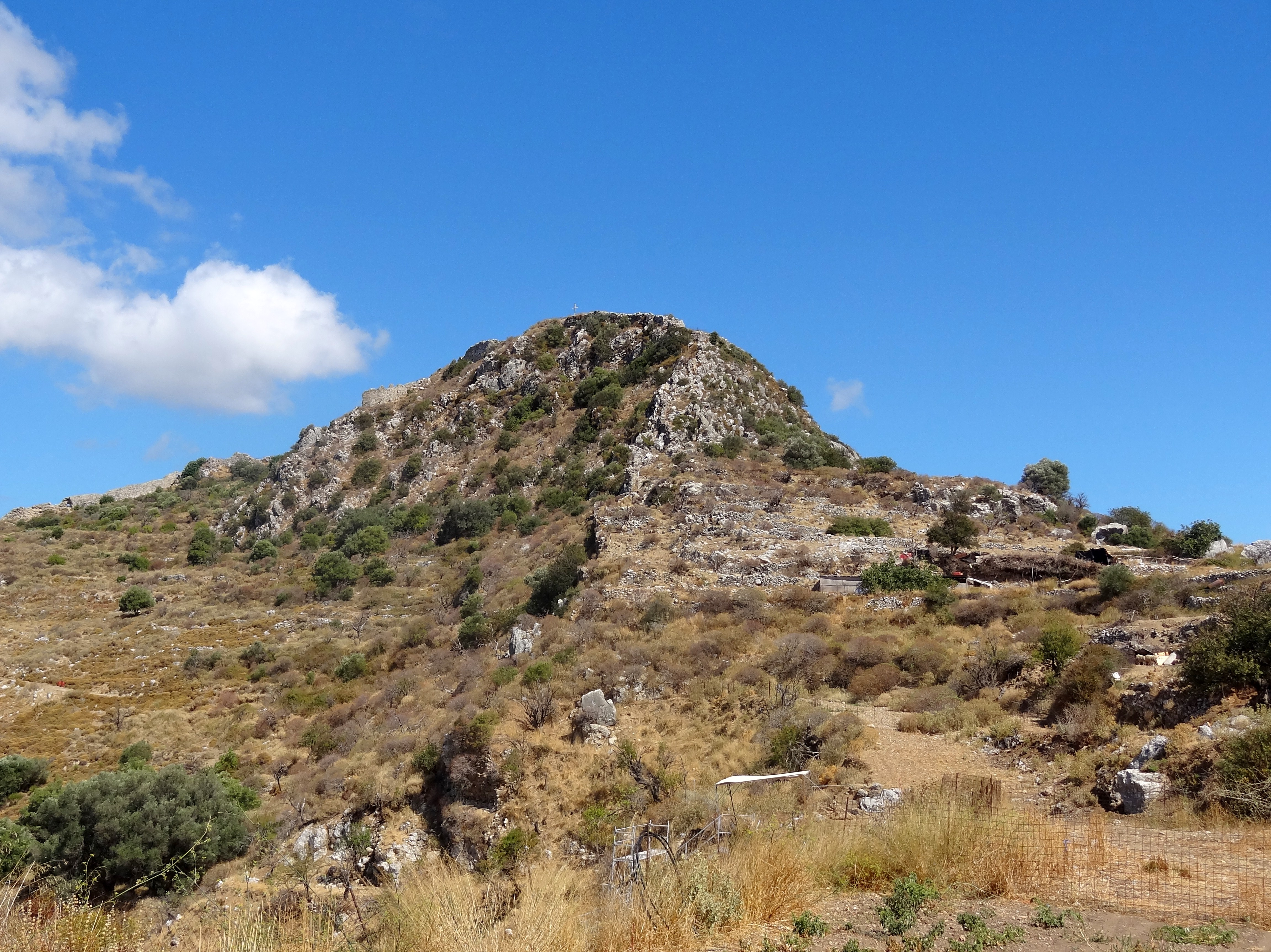 Blick zur Akropolis des antiken Polyrrhenia (Πολυρρηνία), Gemeinde Kissamos, Regionalbezirk Chania, Kreta, Griechenland